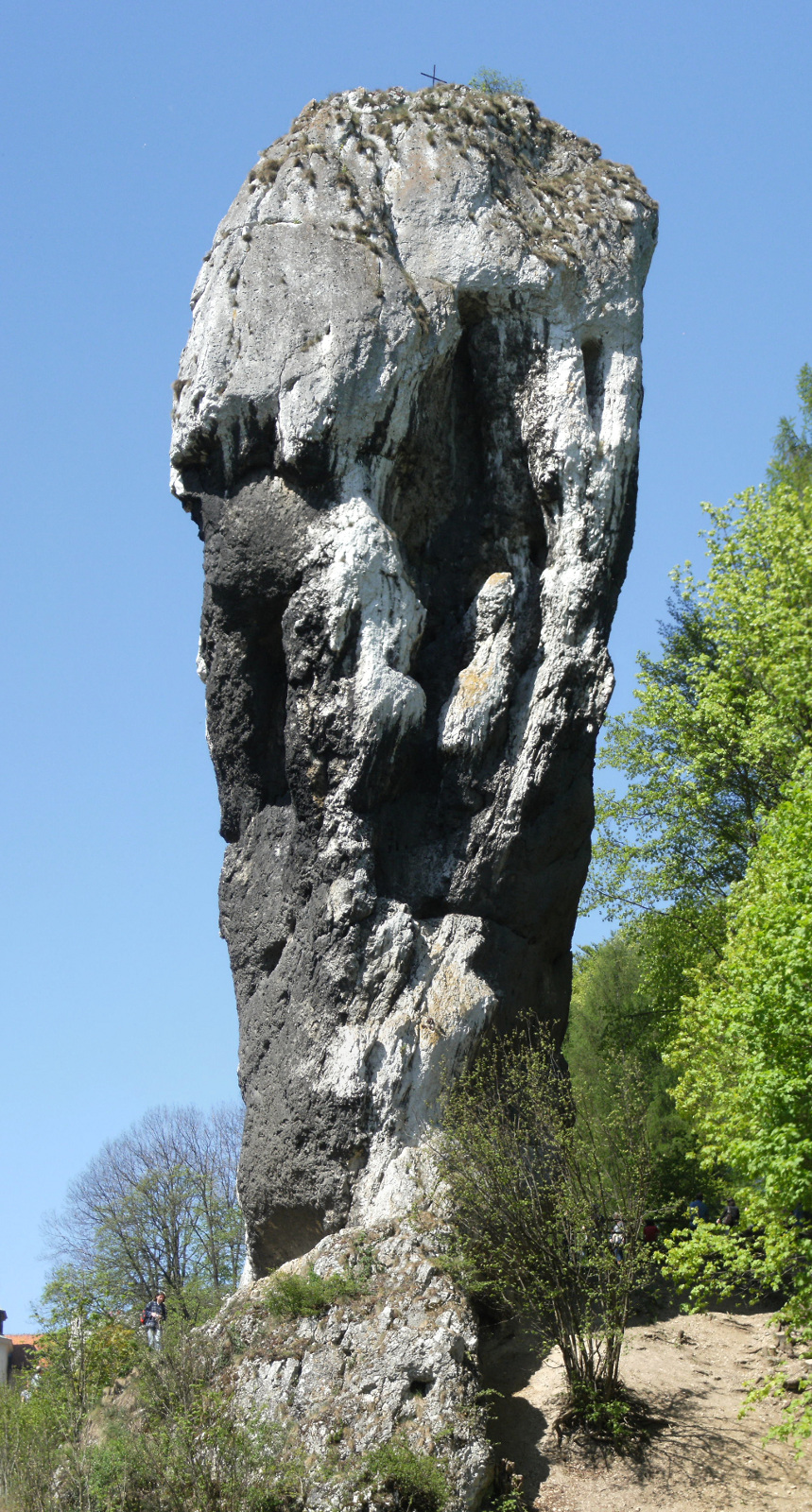 Skała Maczuga Herkulasa w Pieskowej Skale w Ojcowskim Parku Narodowym